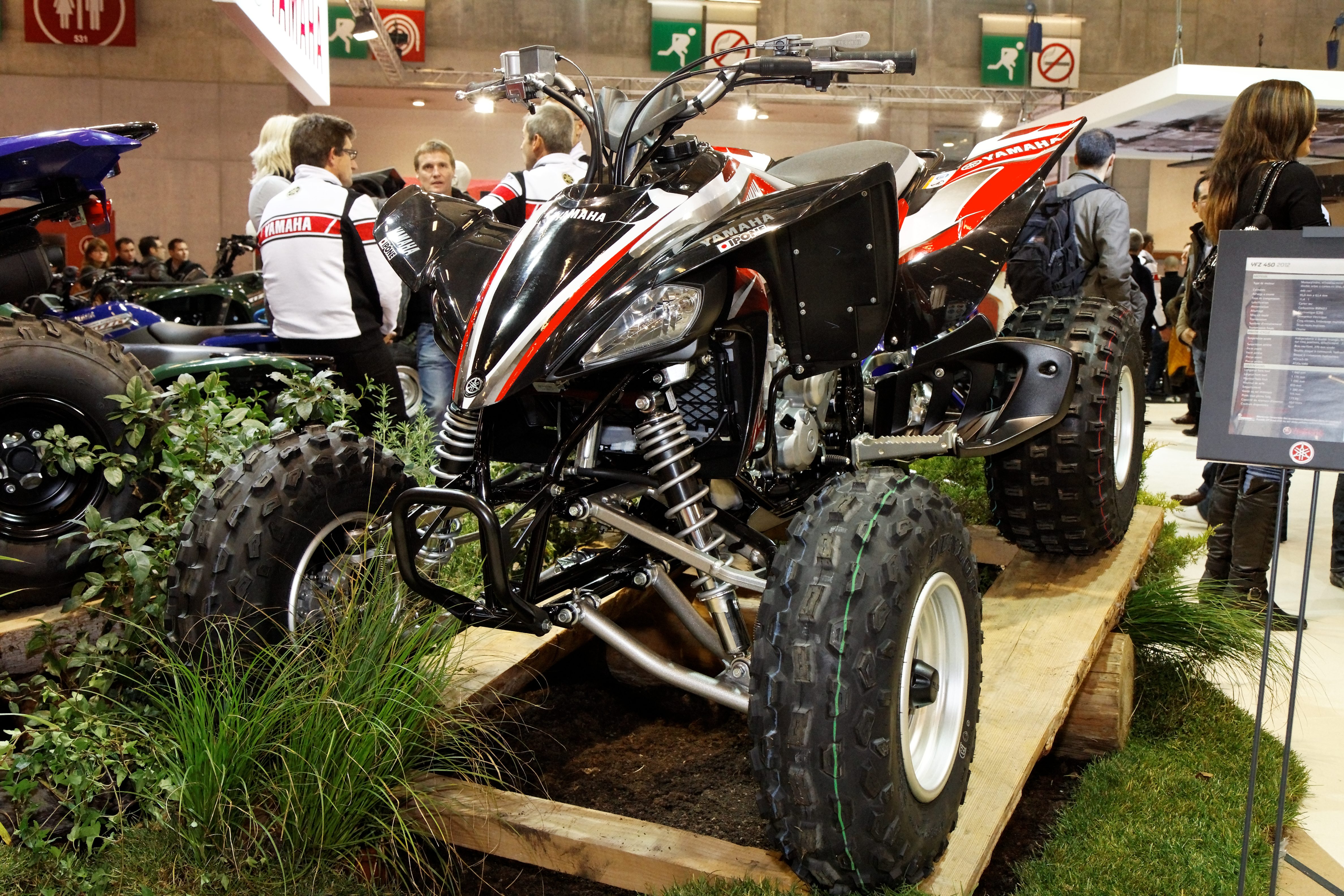 Une moto Yamaha au salon de la moto, Paris, porte de Versailles.